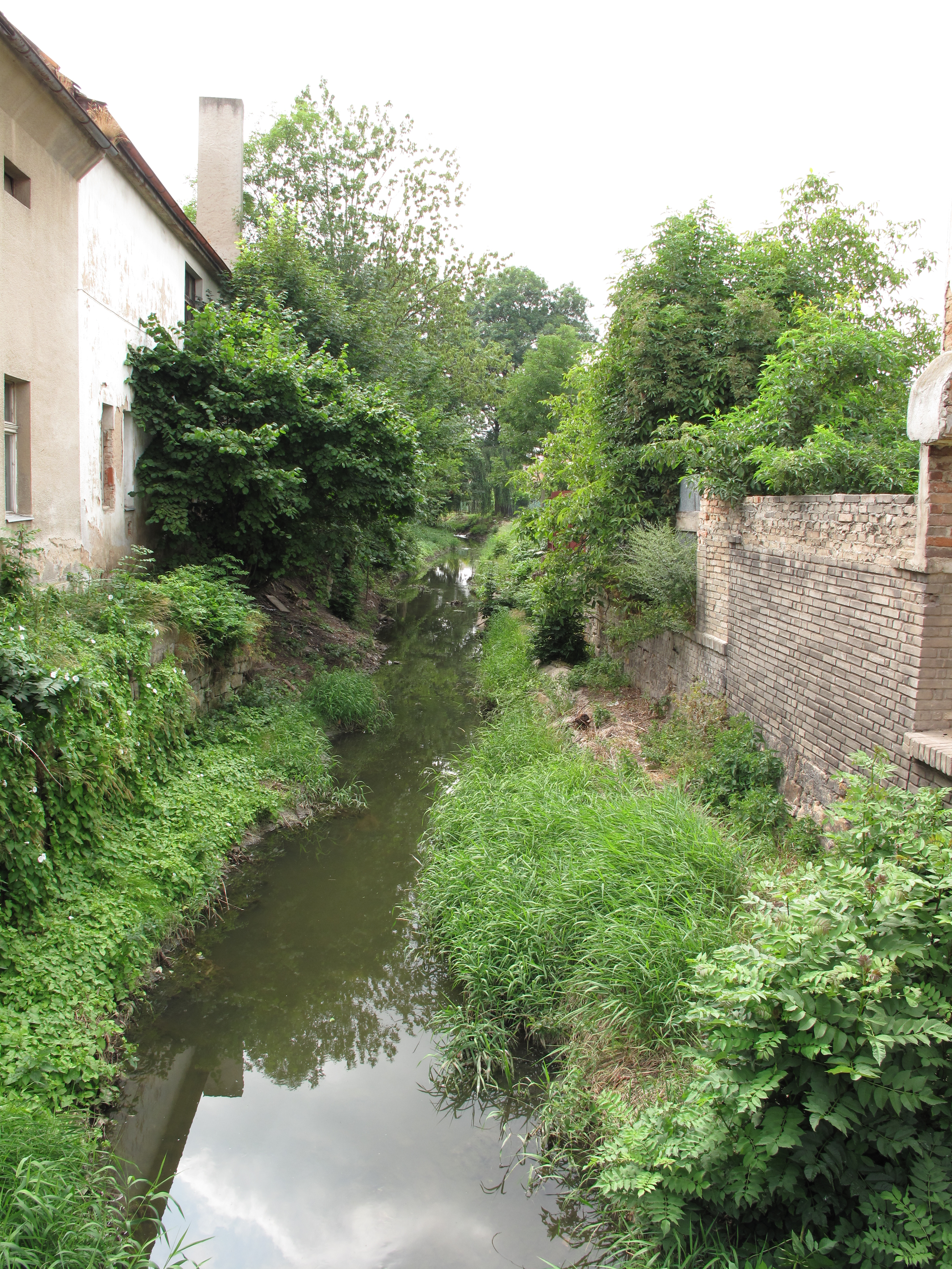 Šembera v Českém Brodě, z mostu ulice Prokopa Velikého proti proudu.